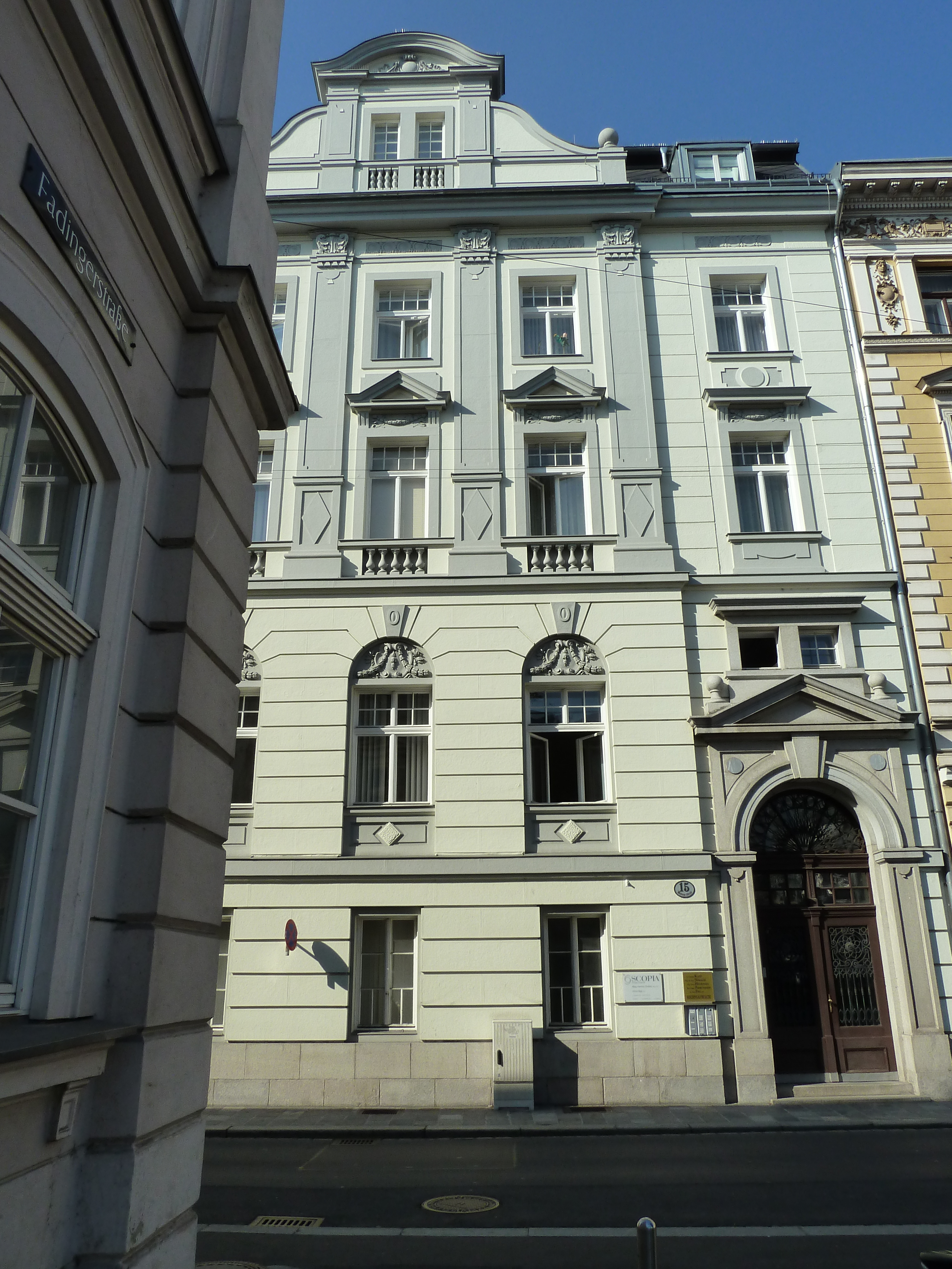 Ehem. Amtshaus